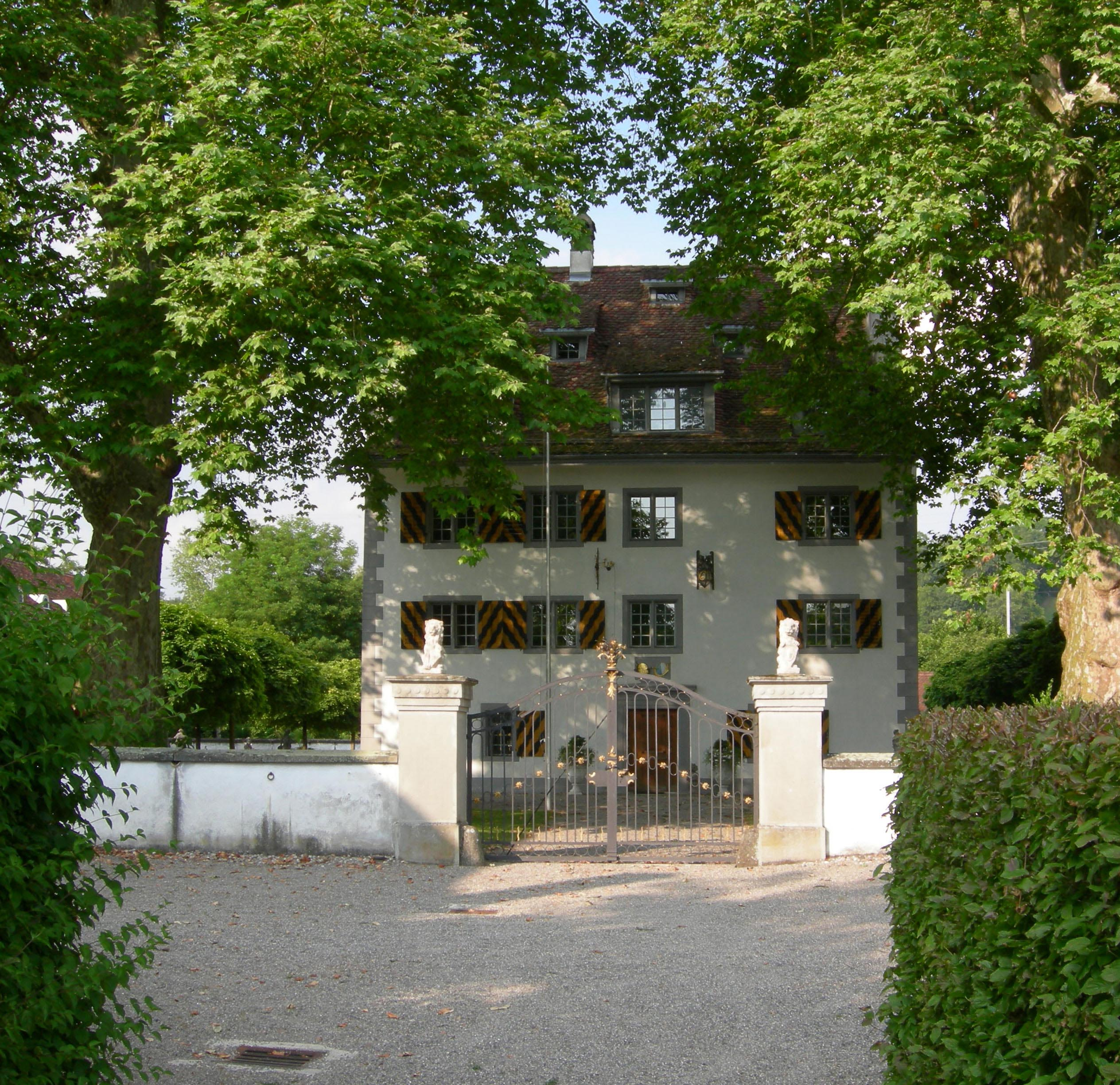 Schloss Knonau, Haupteingang